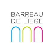 Barreau de LIège